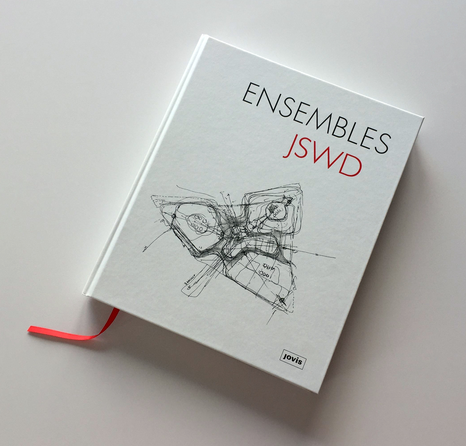 Cover des neuen Buchs "Ensembles" über JSWD Architekten